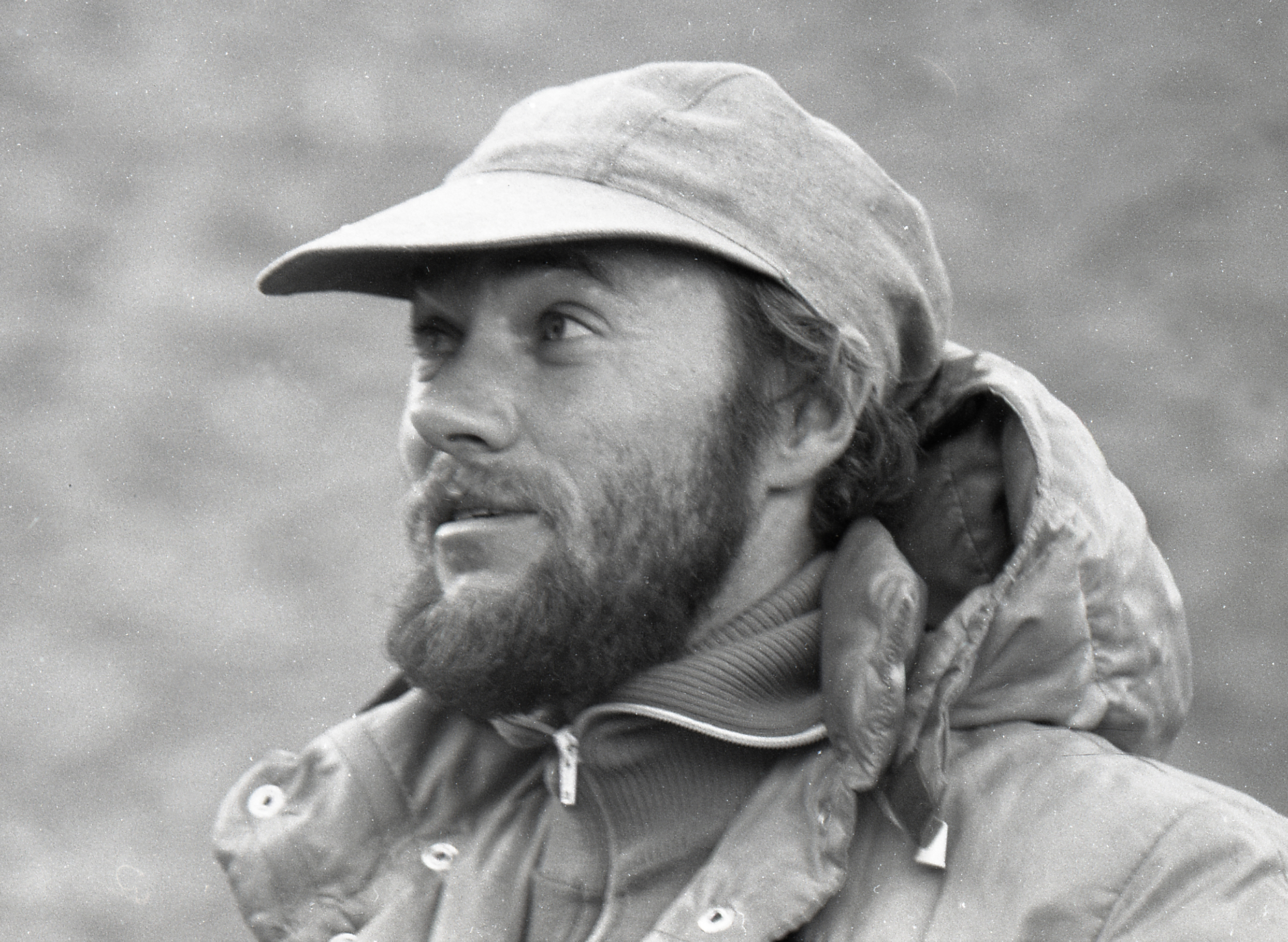 Urmas Grauen